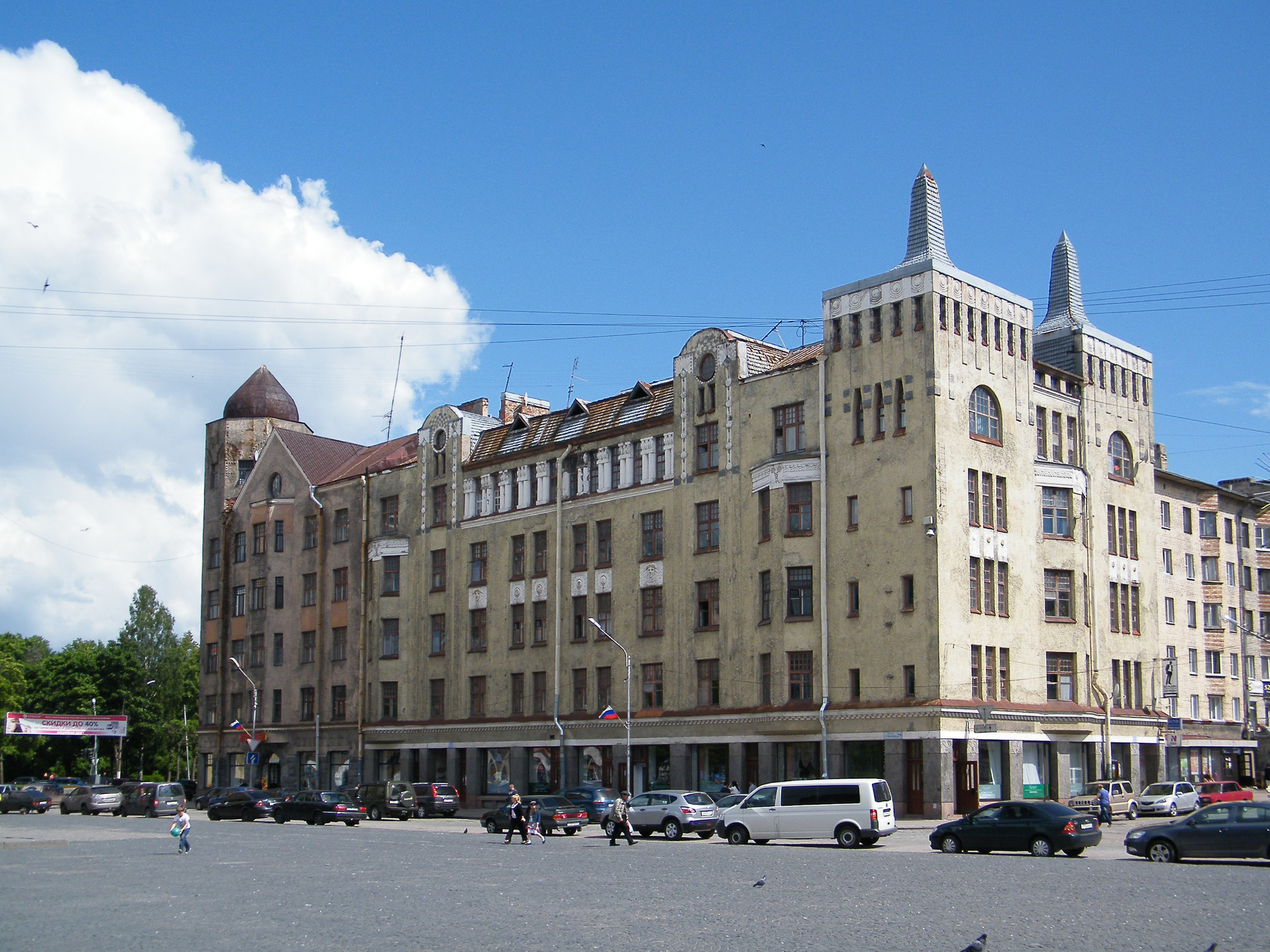 Дом Москвина